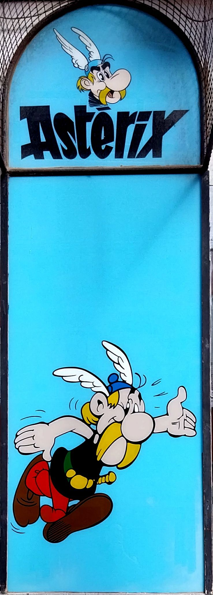 Paisaje urbano de Barakaldo (Bizkaia)